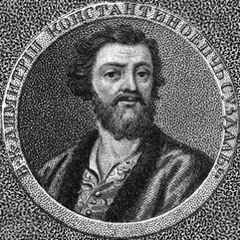 В. к. Димитрий Константинович Суздал.